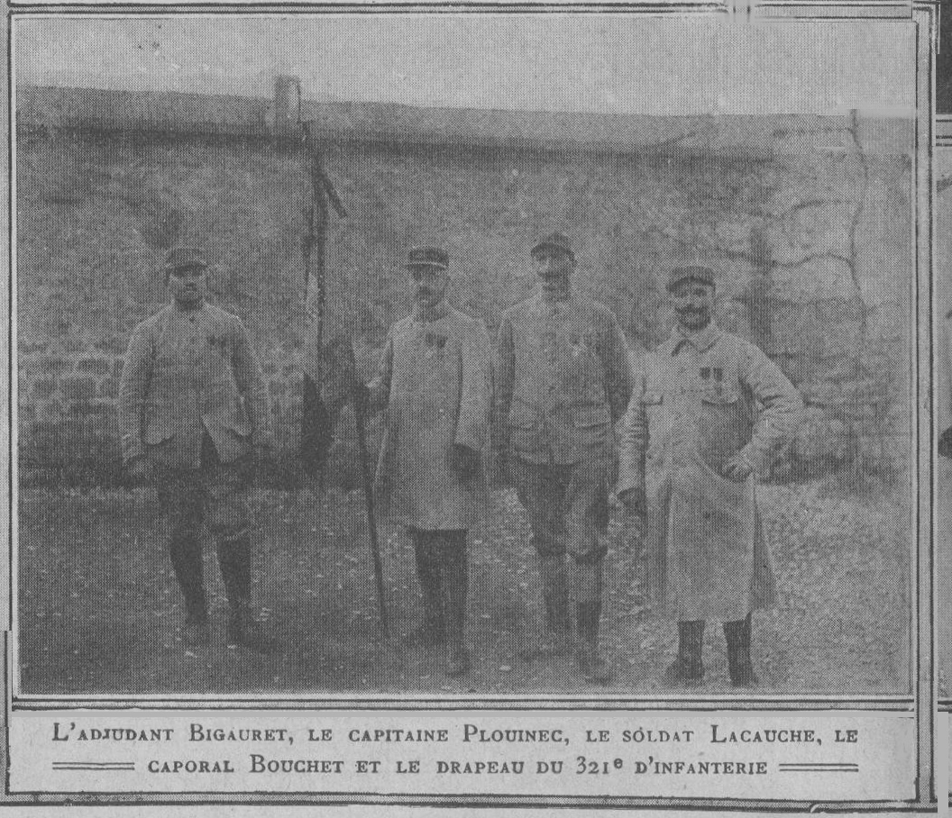 Bigauret, Plouinec, Bouchet et Lacauche du 321e RI après les combats autour de Verdun.